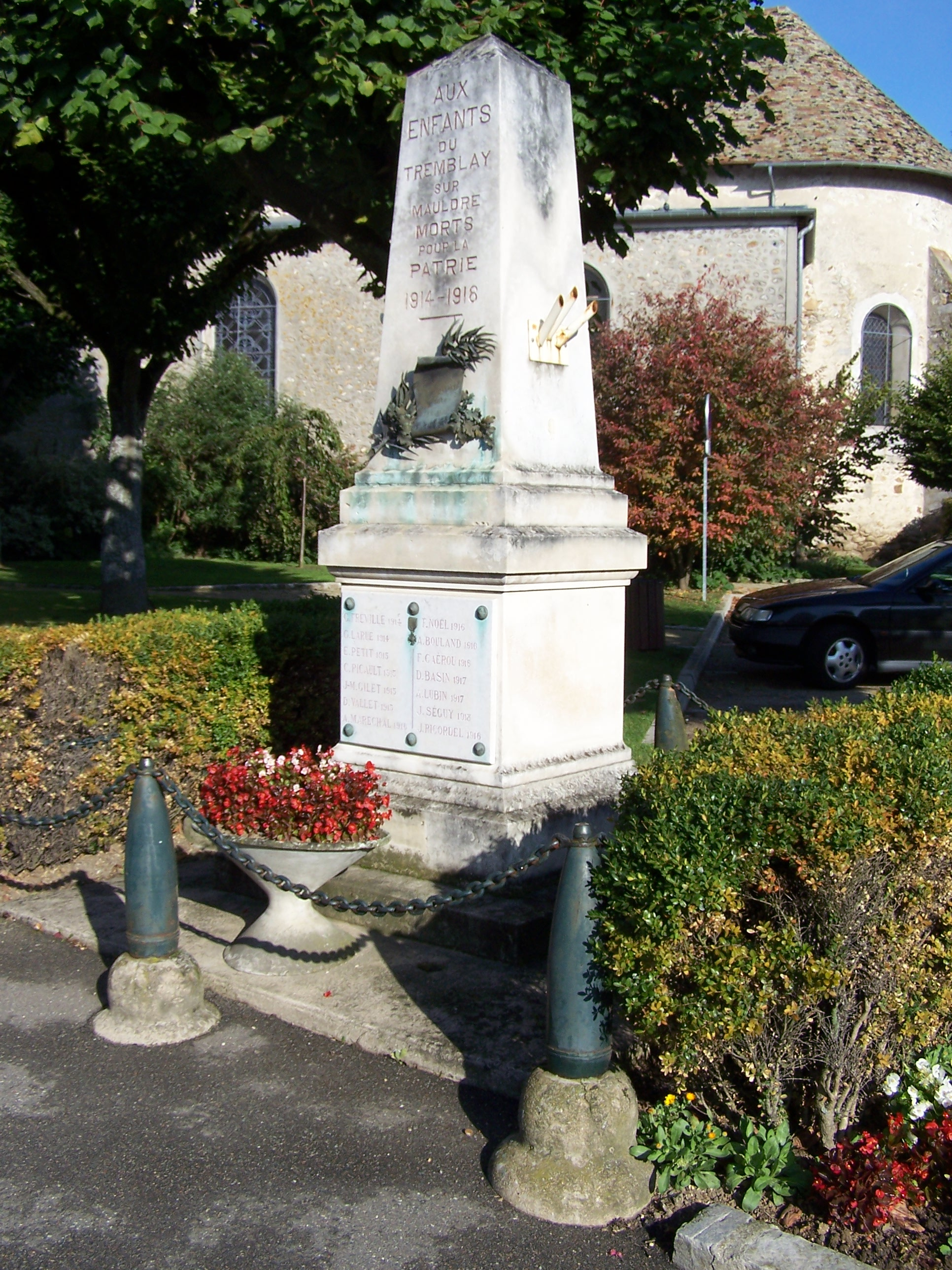 Monument aux morts du Tremblay-sur-Mauldre (Yvelines, France)